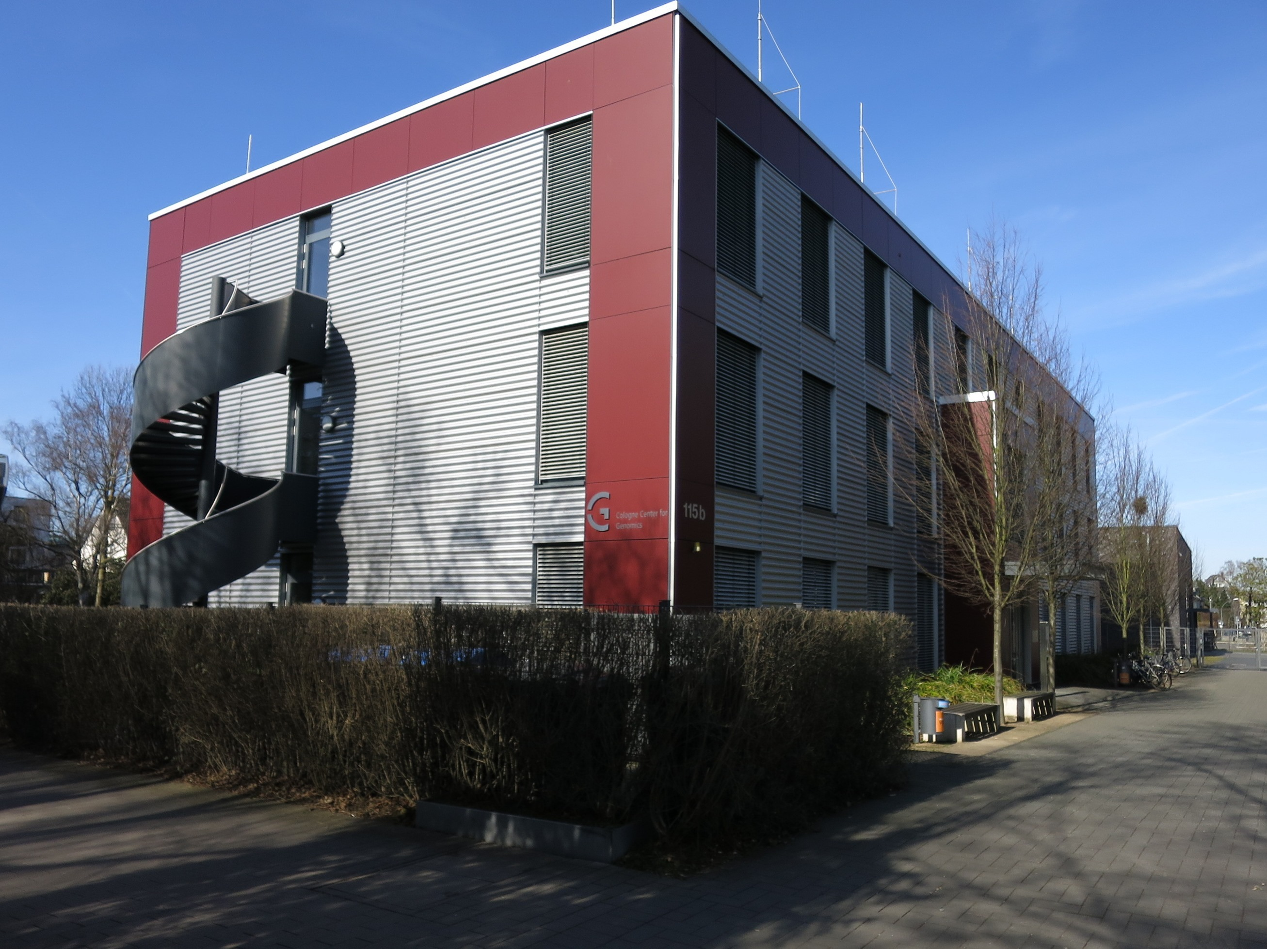 Cologne Center for Genomics (CCfG), Universität Köln